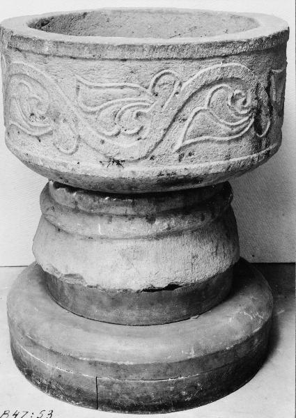 Dopfunt, romansk, cuppa med relief av blomsterslingor. Kategori: (04) DopfuntarDopfunt, romansk, cuppa med relief av blomsterslingor.